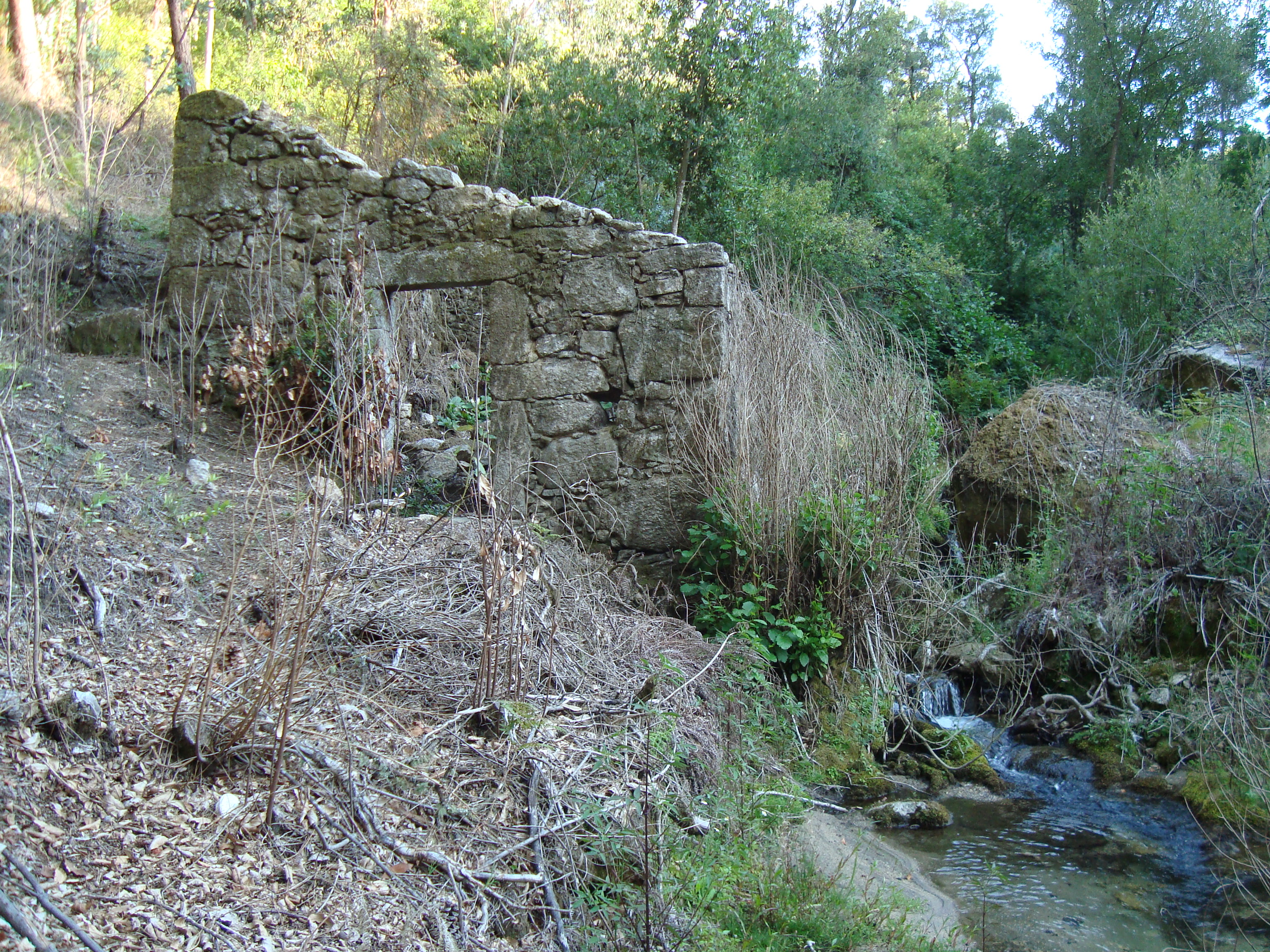 Moinho de água no ribeiro de Santa Marinha, na freguesia de Quintiães, Barcelos, Portugal